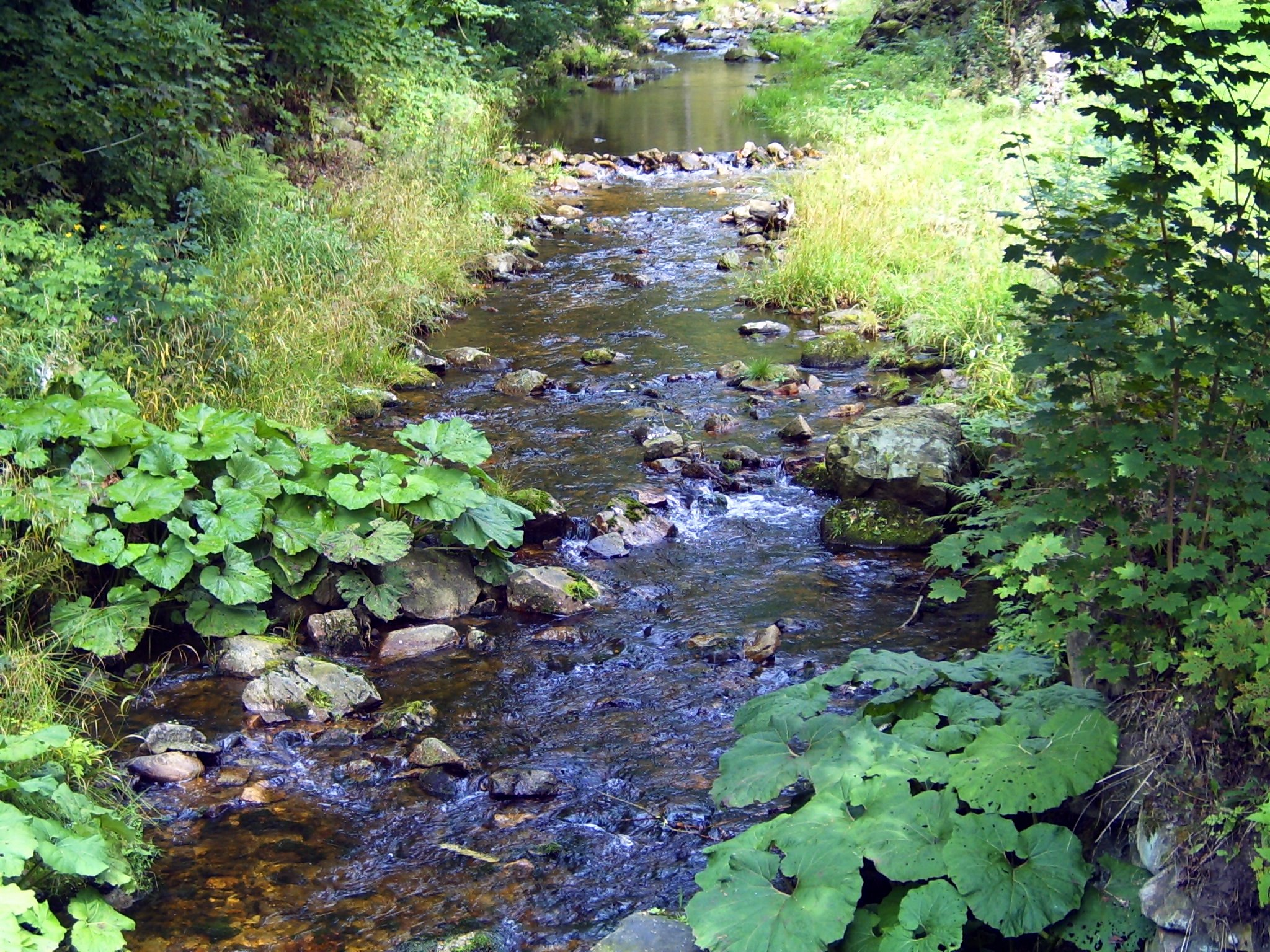 Flájský potok v Českém Jiřetíně.